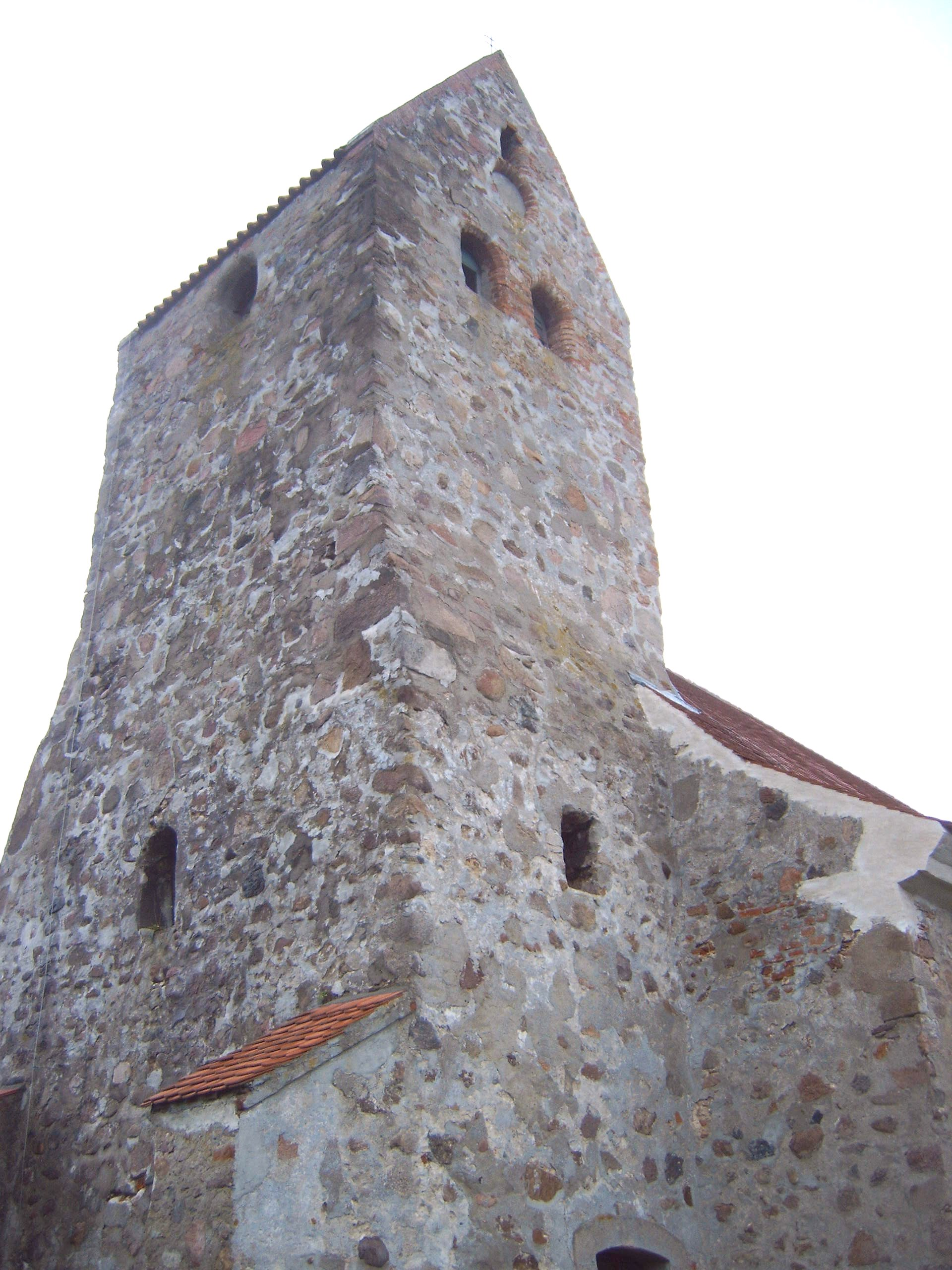 Turm der Dorfkirche Schwiesau, Altmark, Sachsen-Anhalt, Deutschland